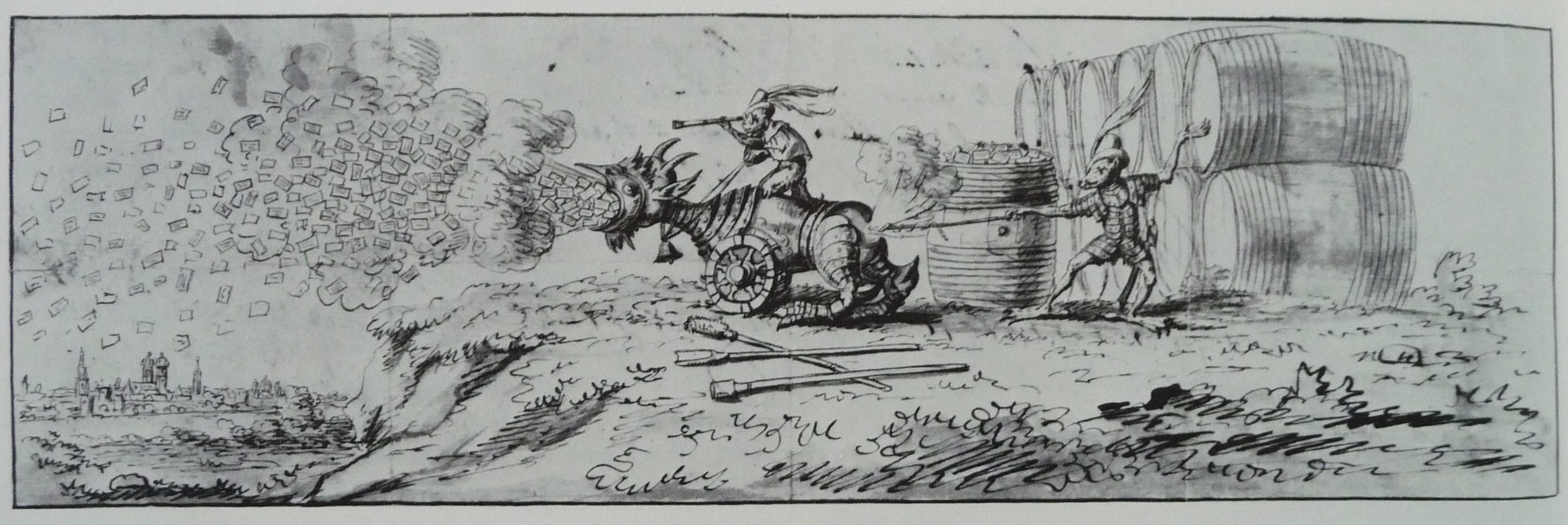 Eine von Teufeln bediente Kanone bombardiert München mit Flugblättern des Illuminatenordens.